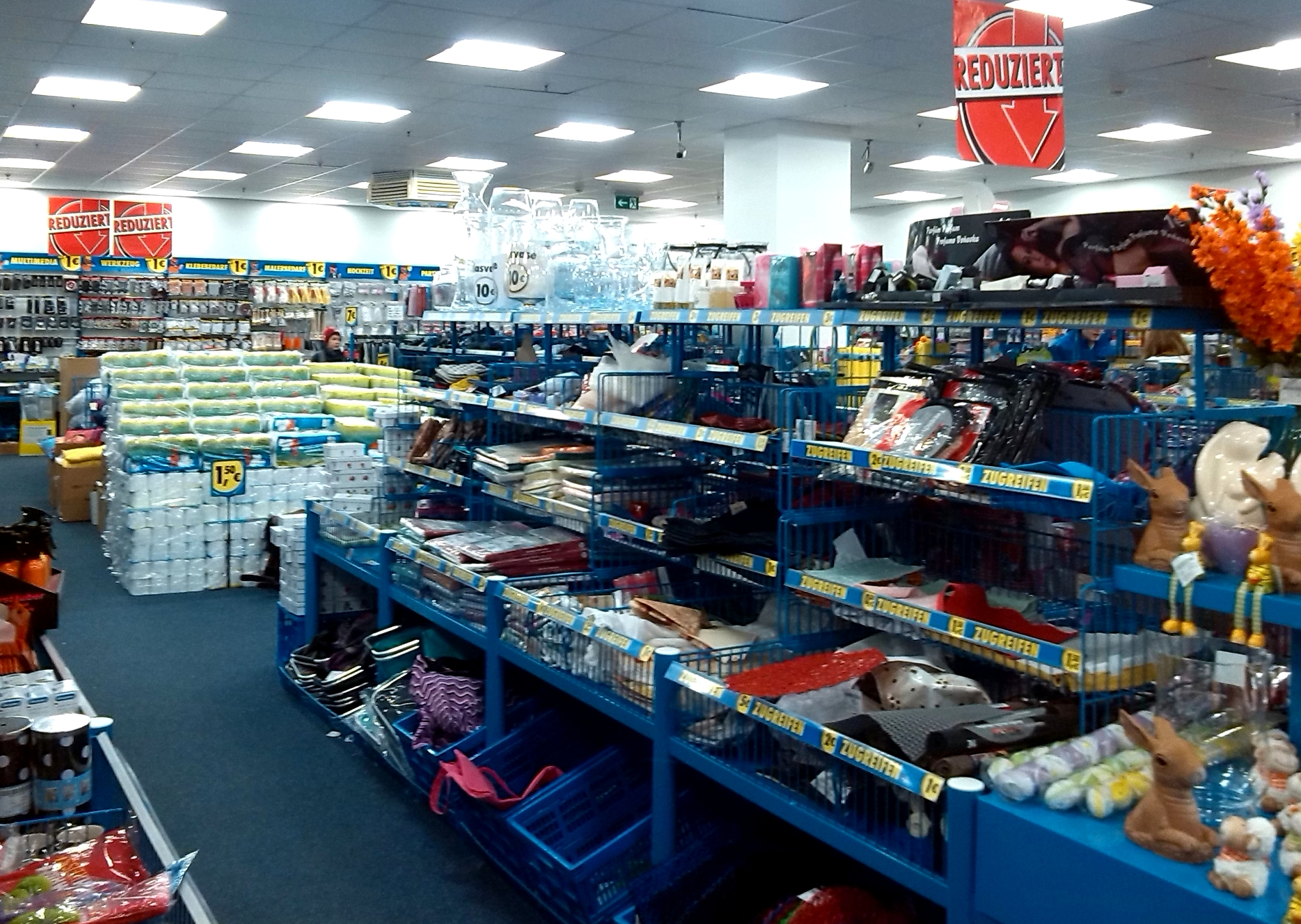 TEDi-Filiale von Innen.